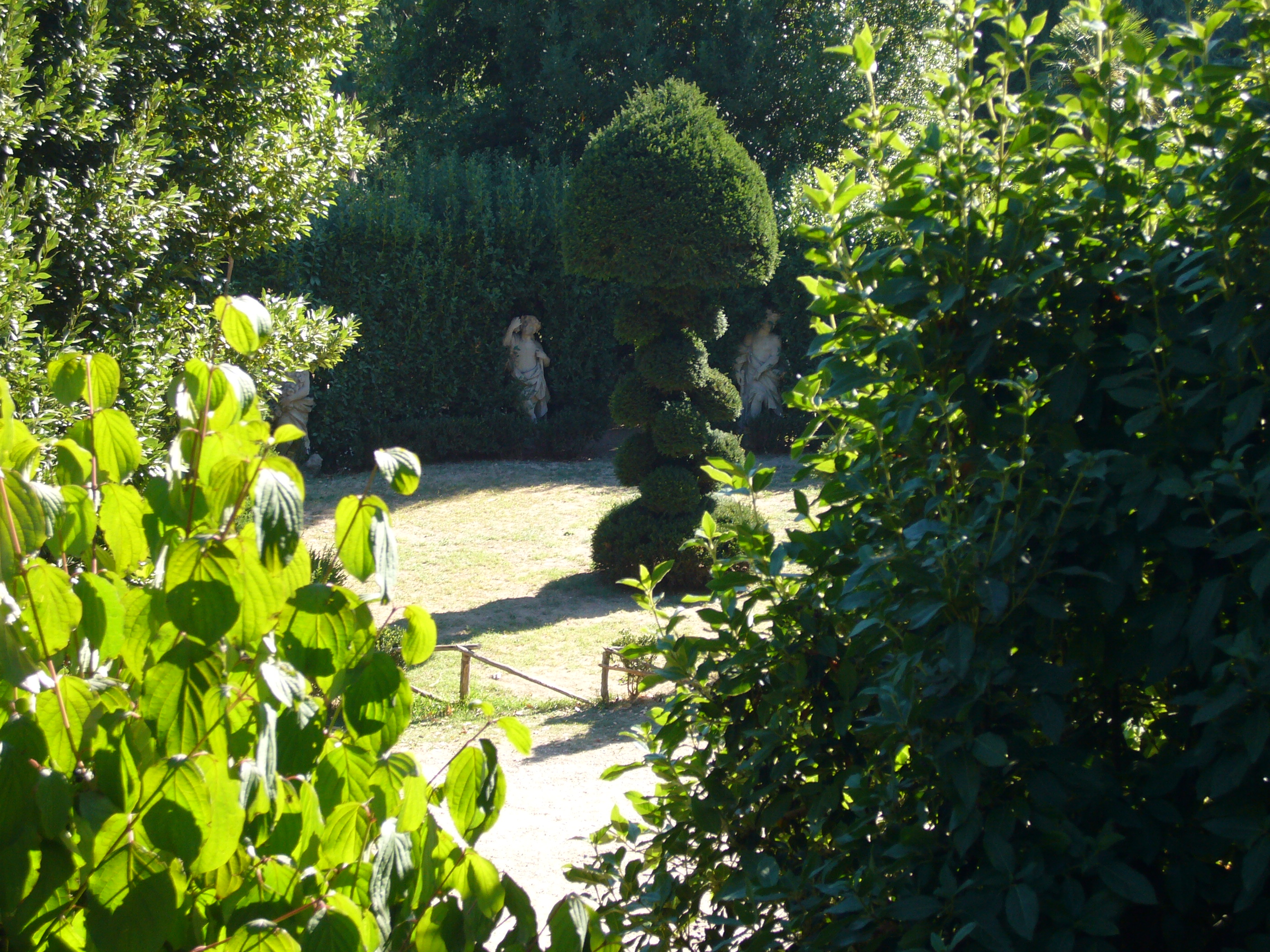 Roma, villa Sciarra: topiario nell'esedra arborea